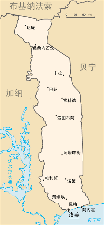 多哥地图。